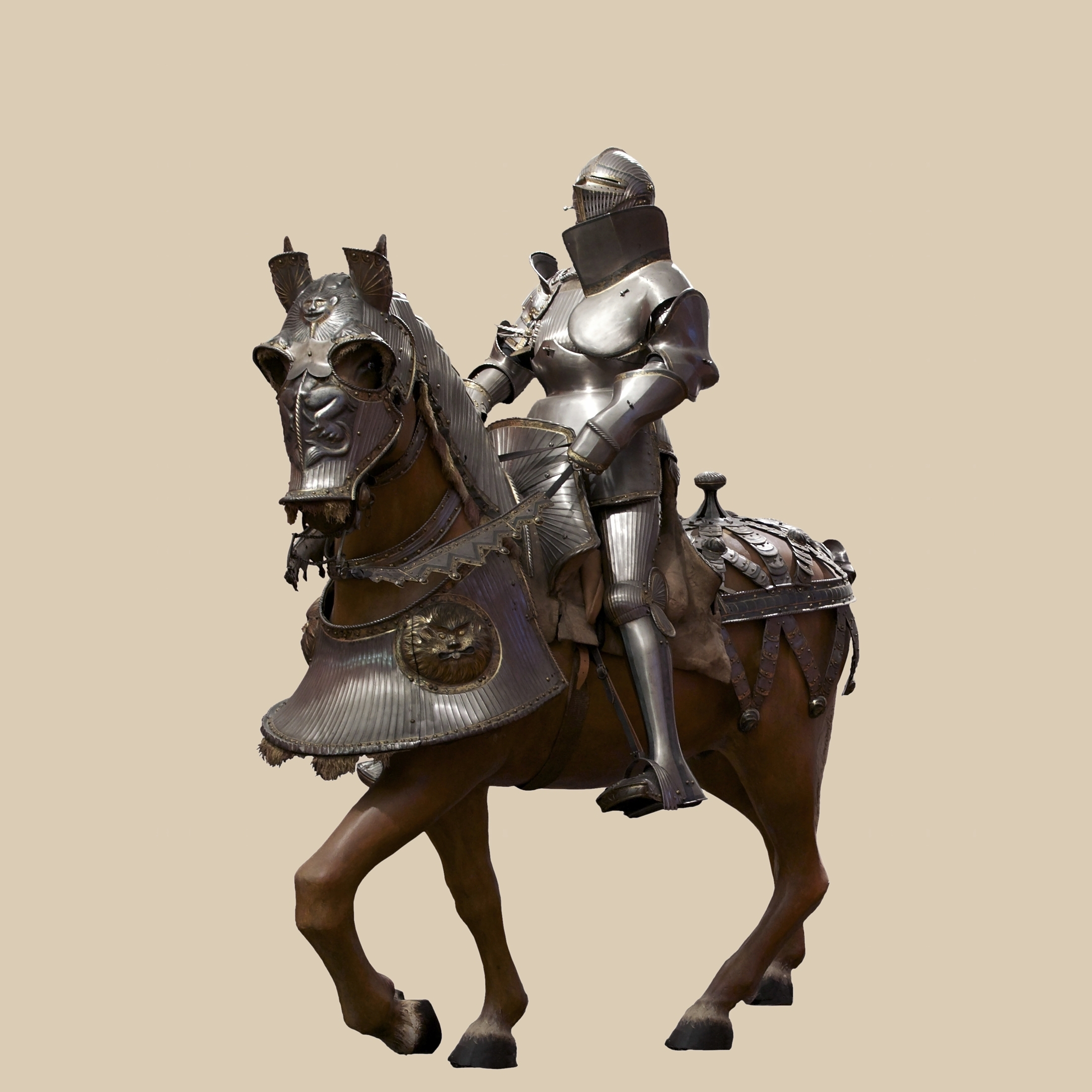 Harnachement cuirassé.